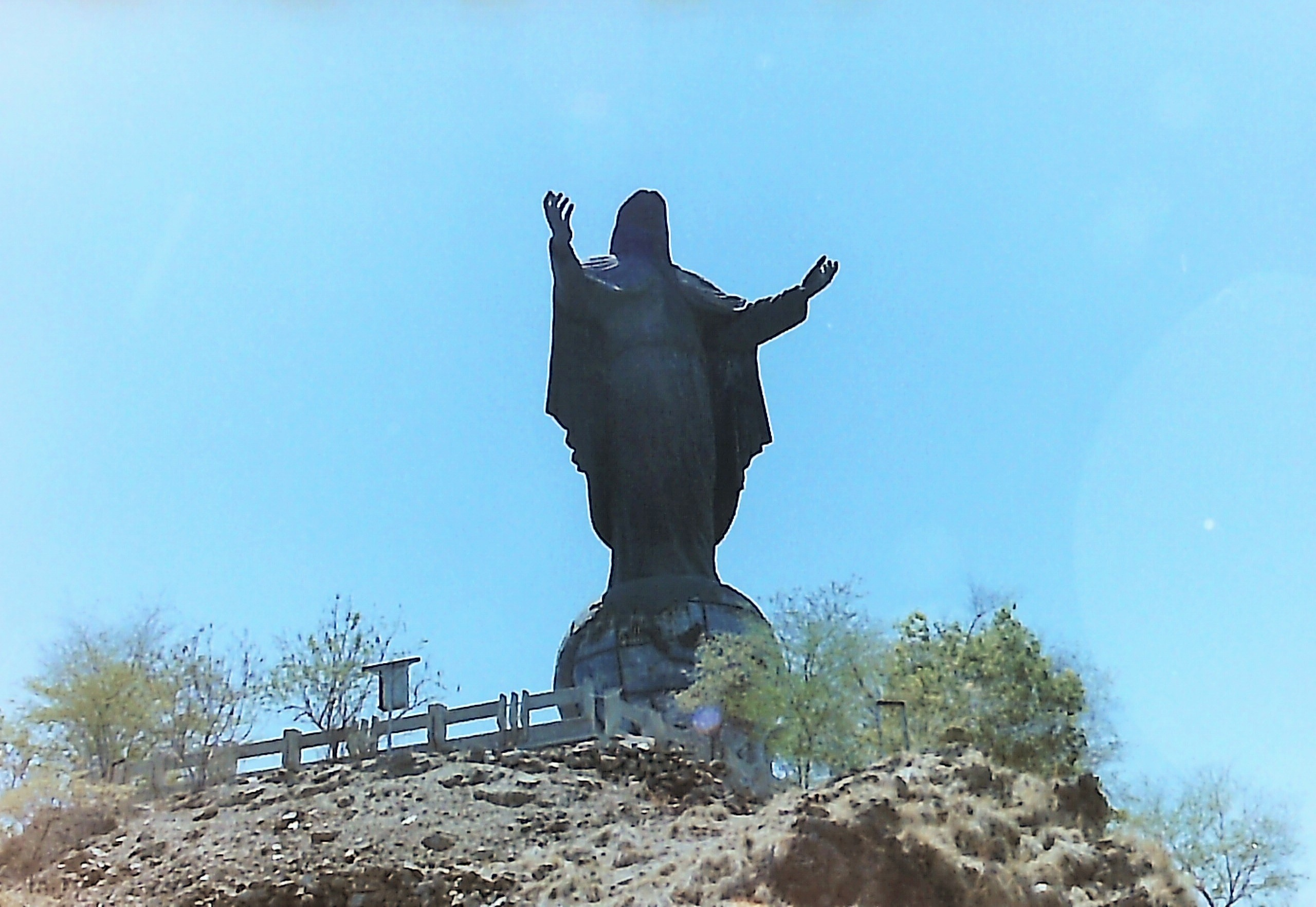 東ティモールのディリ郊外にあるファツカマ岬に聳えるキリスト像 2007年9月訪問時撮影（フィルムスキャナーでネガをデジタル画像化）